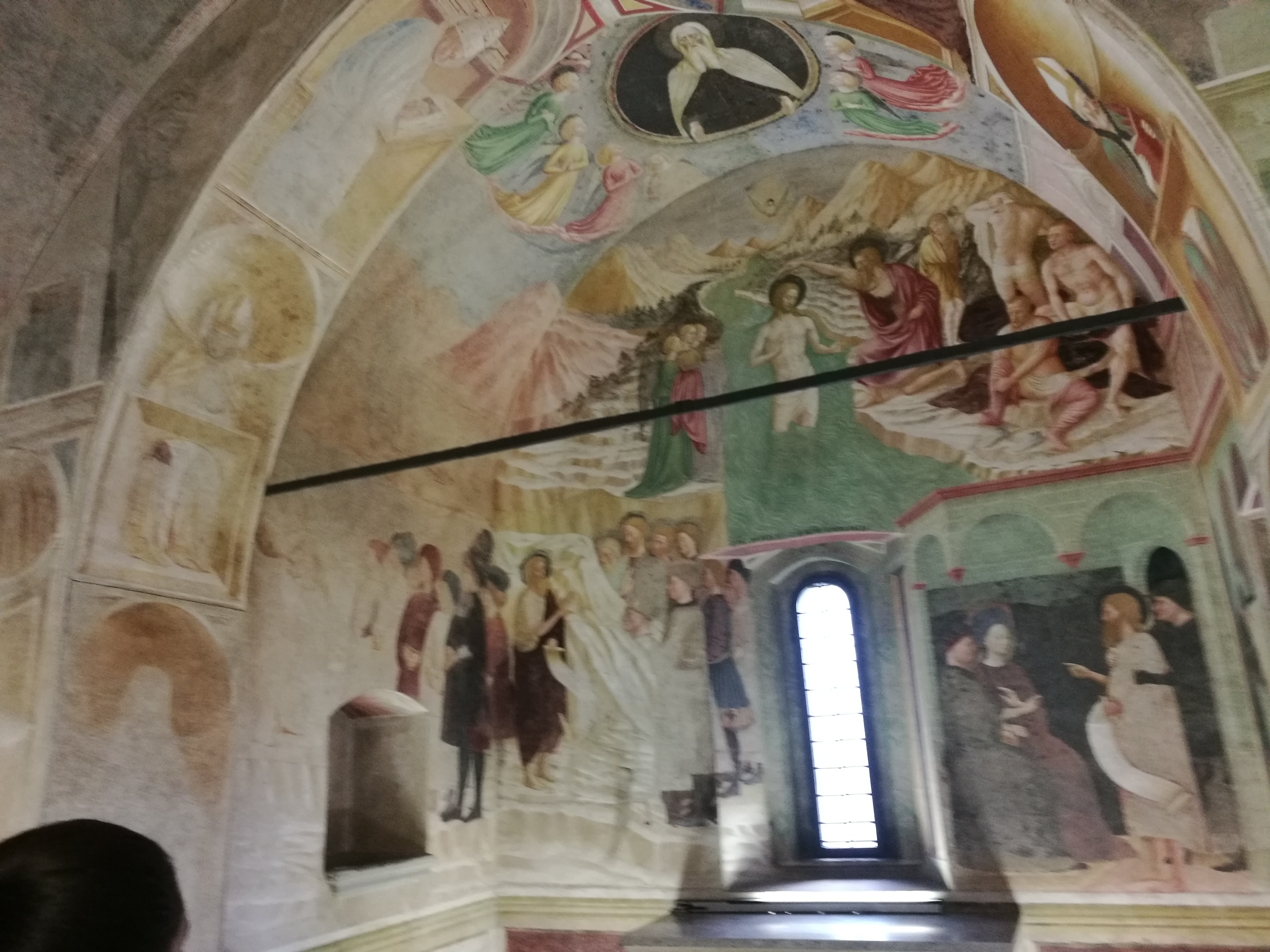 Abside del Battistero della Colleggiata di Castiglione Olona . Affreschi di Masolino da Panicale. In basso a sinistra Giovanni presenta Gesù ai seguaci ; a destra Giovanni a giudizio da Erode. In alto Battesimo di Gesù Sulla volta: Padre Eterno ed Angeli Sull' arcone: I 4 Dottori della Chiesa